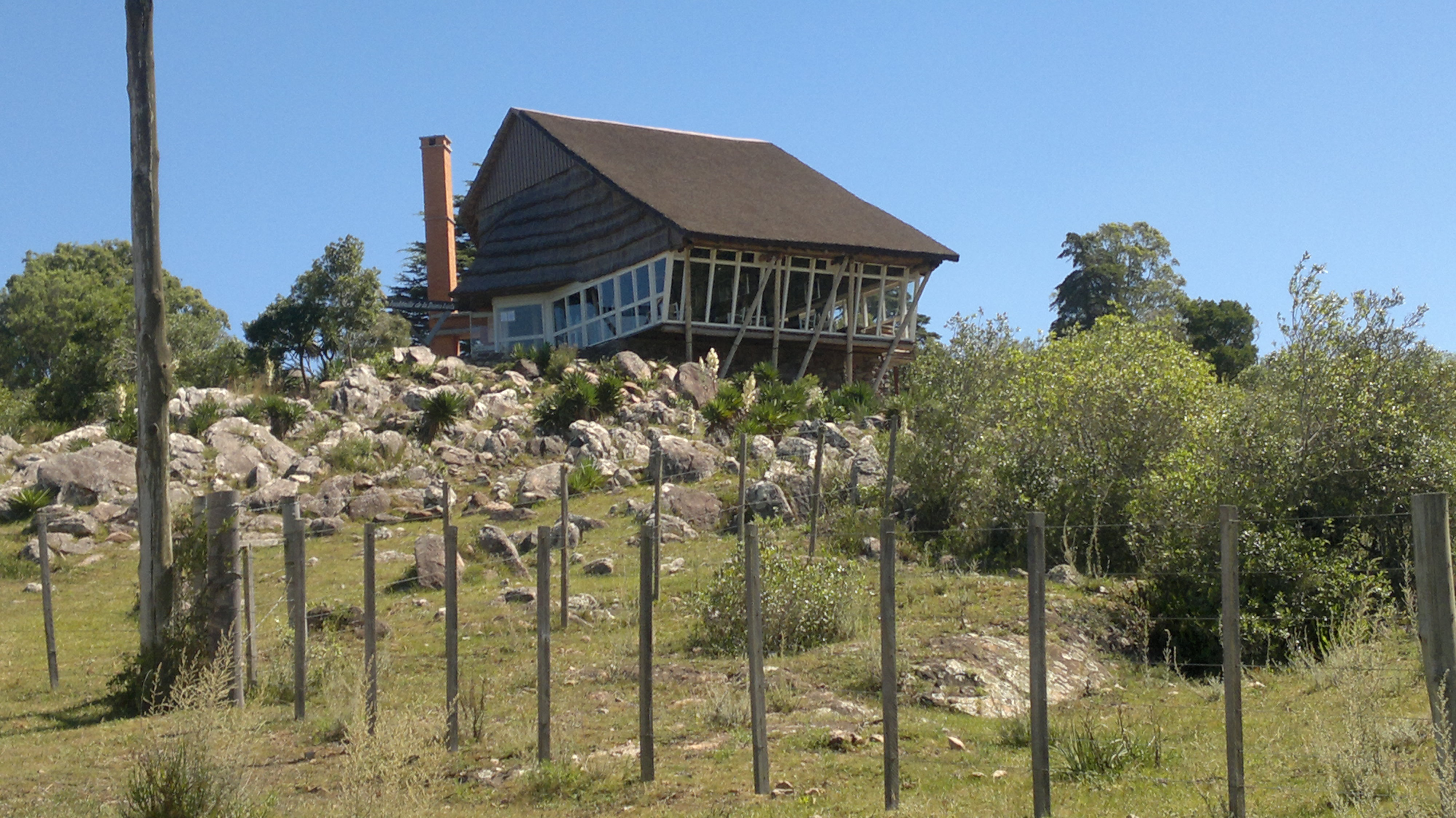 Ventorrillo de la Buena Vista. Ubicada en el departamento de Lavalleja